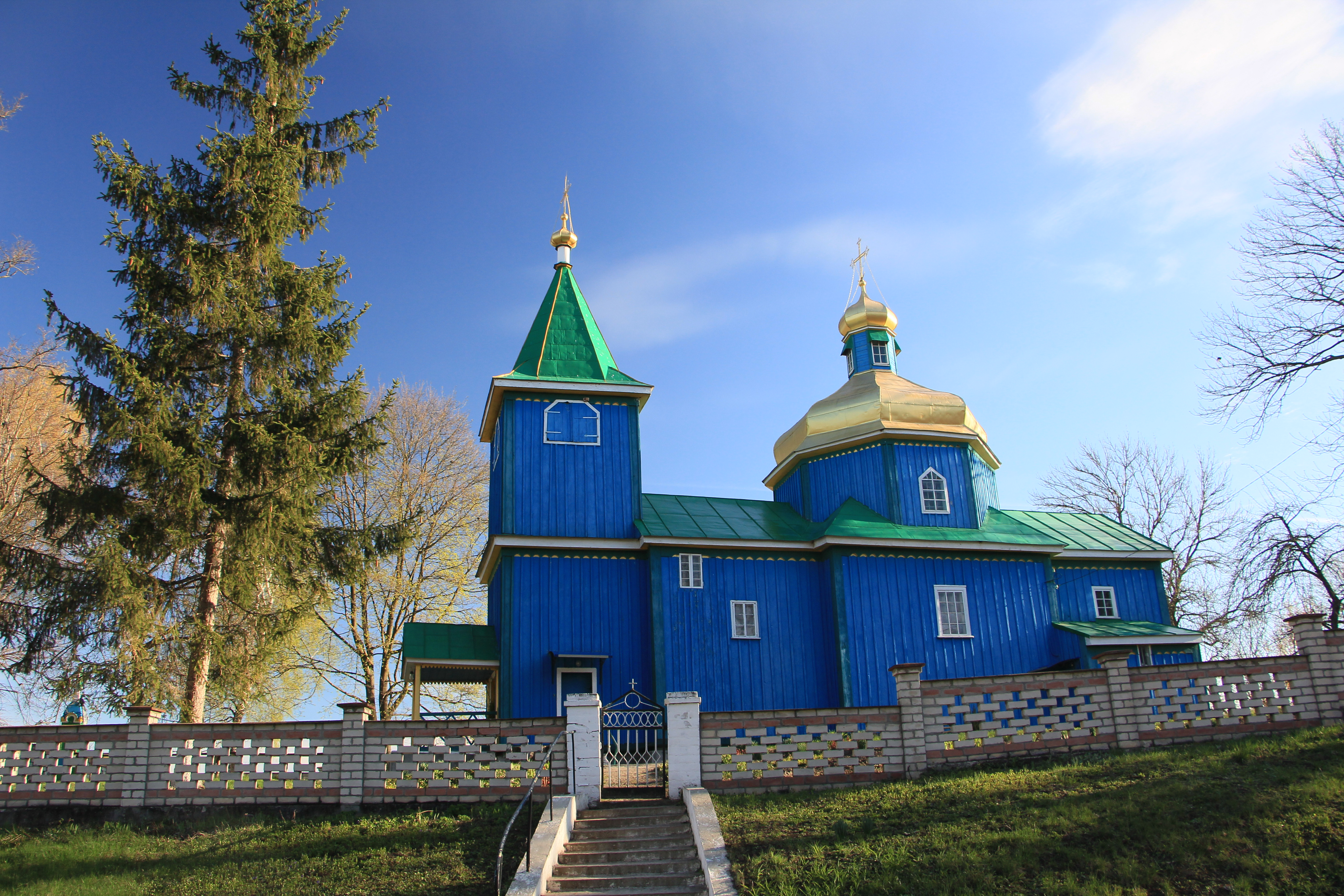 Дерев'яна церква в селі Темногайці Шумського району Тернопільської області